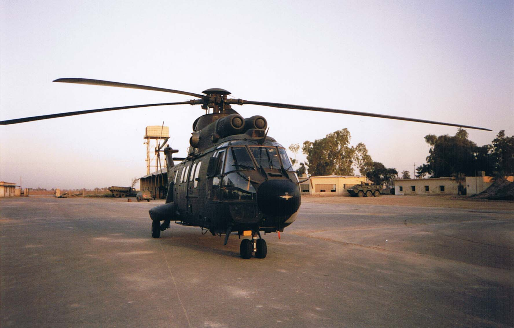 Helicoptero superpuma famet